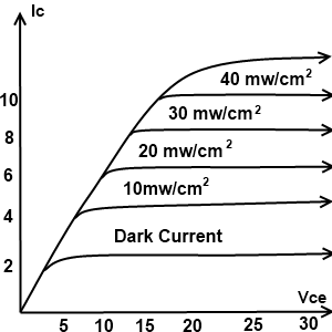 Karakteristika statike e fototransistorit